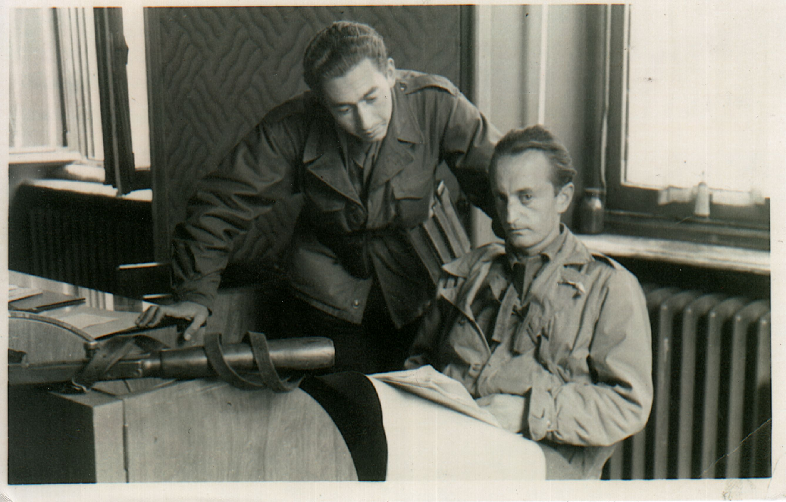 Cuneo, fine aprile 1945: nella sede del comando militare partigiano immediatamente dopo lìoccupazione della città.